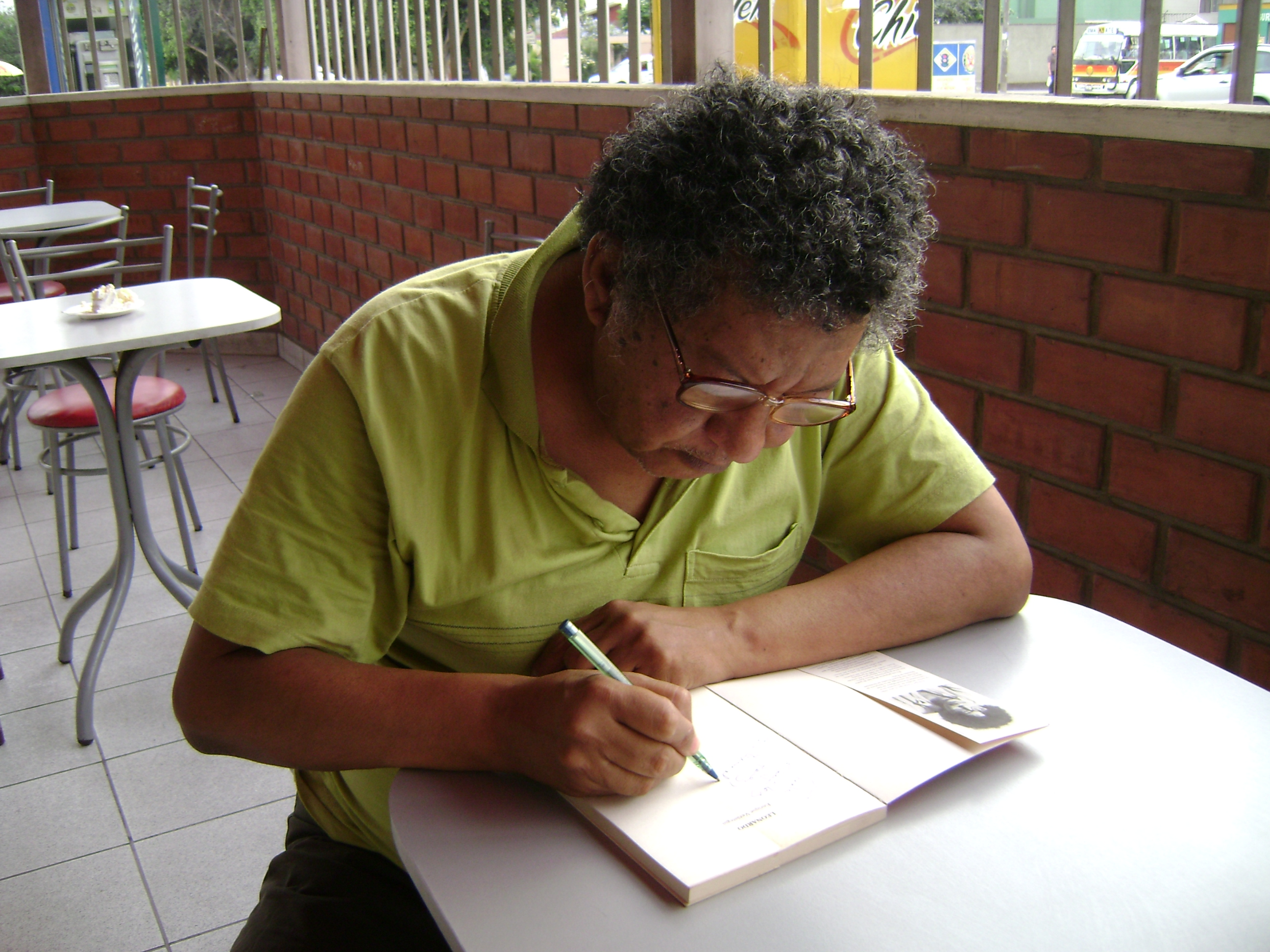 Escritor peruano.